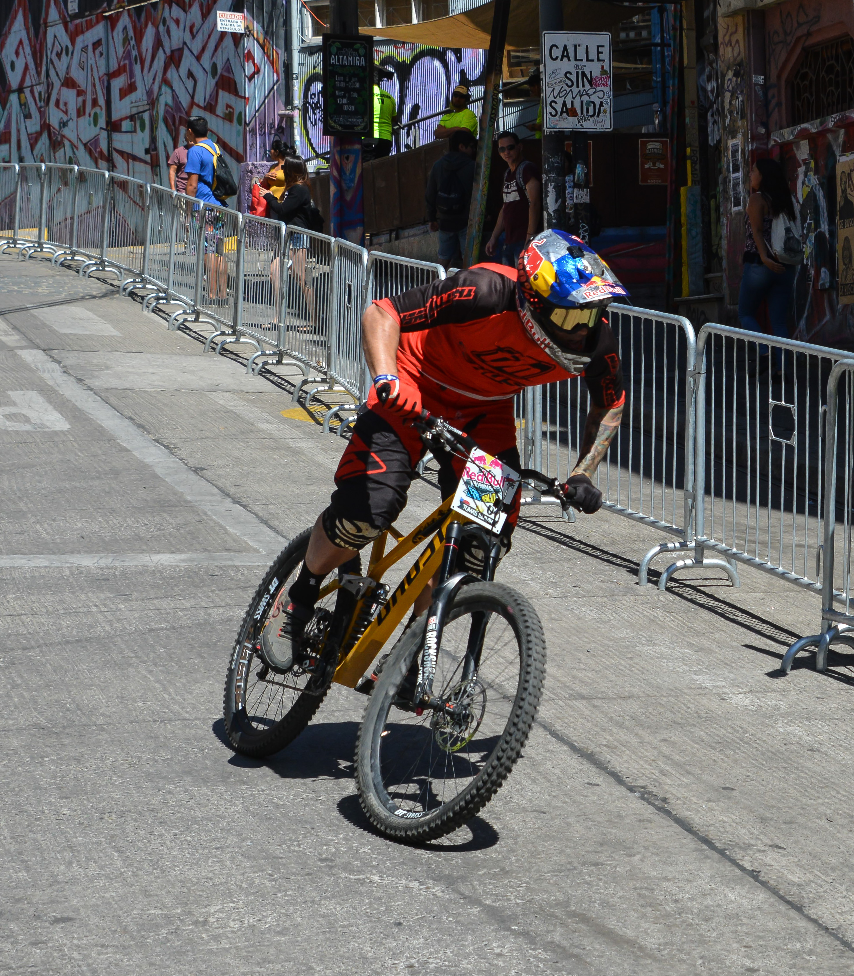 Tomáš Slavík en Valparaíso Cerro Abajo 2018, Chile.